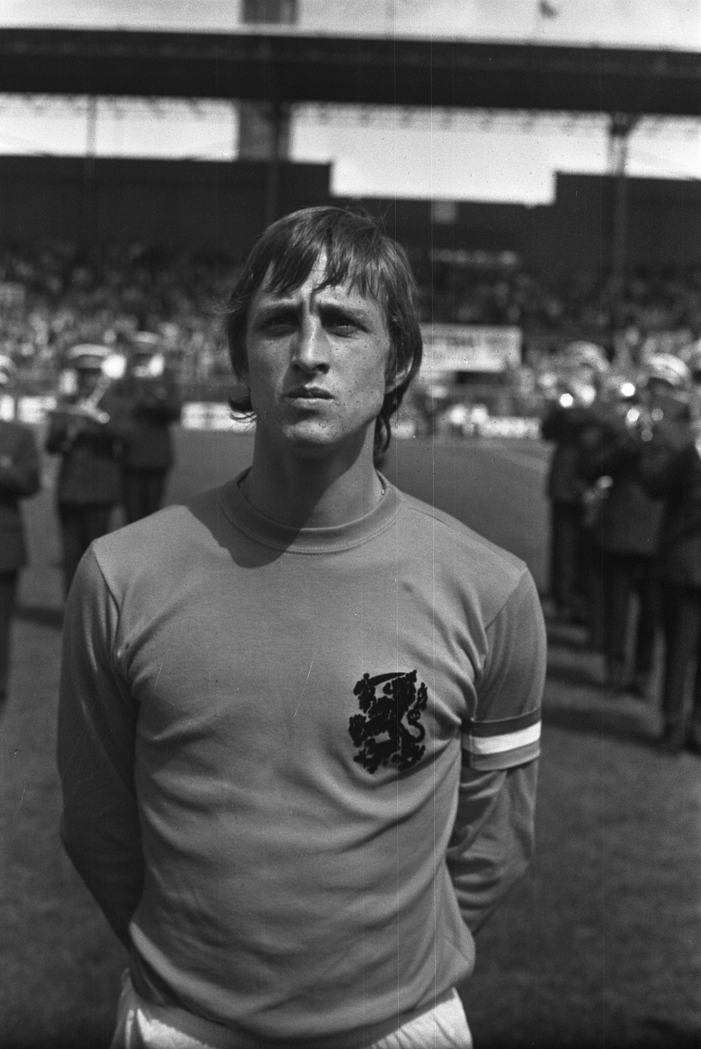 Oefeninterland Nederland tegen Argentinie 4-1; nr. 6, 7 Cruijff, kop